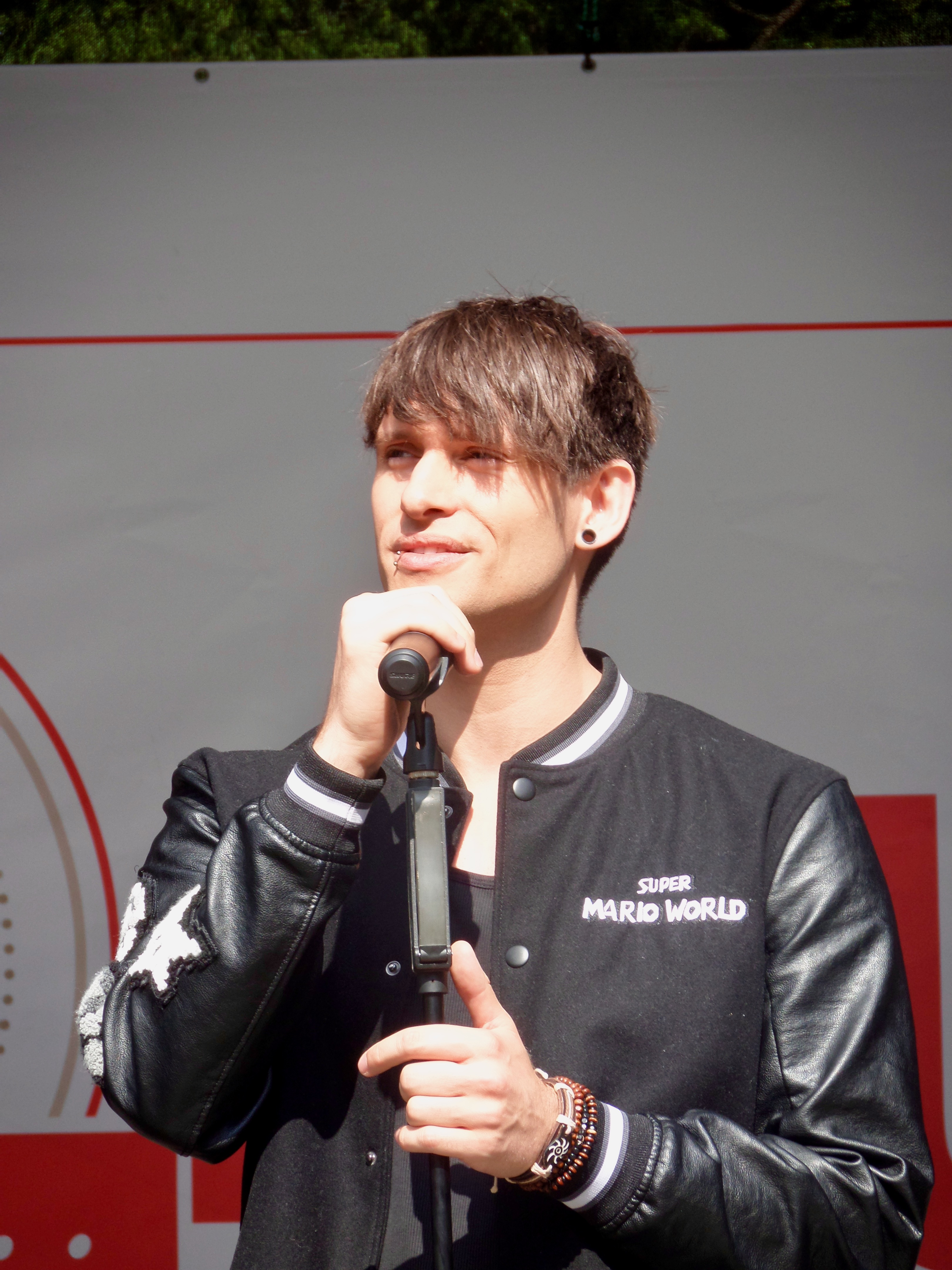 Alexander Jahnke beim Sandkruger Familienfest